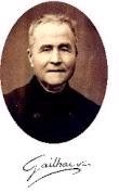 Jean gailhac